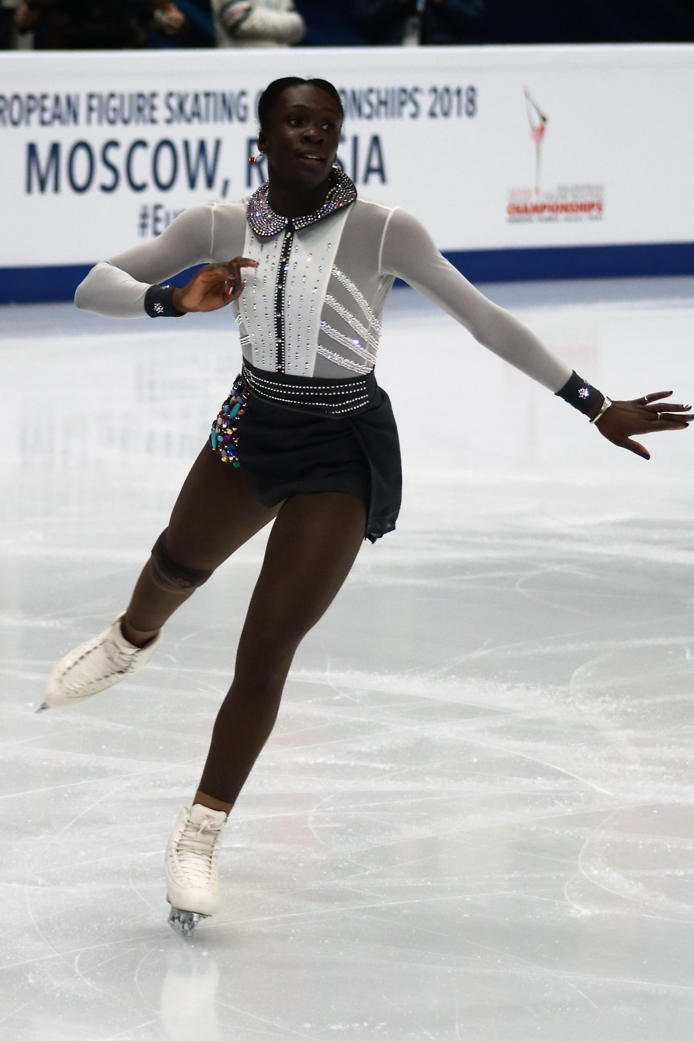 Маэ Беренис Мейте (Франция) на Чемпионате Европы по фигурному катанию 2018.